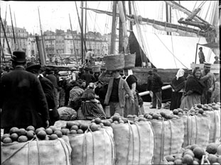 Fonds Trutat - Photographie ancienne Cote : TRU C 2748 Localisation : Fonds ancien (S 30) Original non communicable Titre : Marchandises sur le port, Marseille, avril 1899 Auteur : Trutat, Eugène Rôle de l’auteur : Photographe Lieu de création : Marseille (Bouches-du-Rhône) Date de création : 1899 Mesures : : 4,5 x 5,5 cm Observations : Note manuscrite de Trutat : " Avril 1899, Marseille ". Un tirage papier. Mot(s)-clé(s) : -- Port -- Voilier -- Marchandises -- Marché -- Etalage -- Panier -- Femme -- Costume traditionnel -- Homme -- Costume ouvrier -- Sac -- Marseille (Bouches-du-Rhône) -- Bouches-du-Rhône (Provence-Alpes-Côte d'Azur) -- Provence-Alpes-Côte d'Azur (France) -- 19e siècle, 4e quart Médium : Photographies -- Négatifs sur plaque de verre -- Noir et blanc -- Scènes Bibliothèque de Toulouse. Domaine public